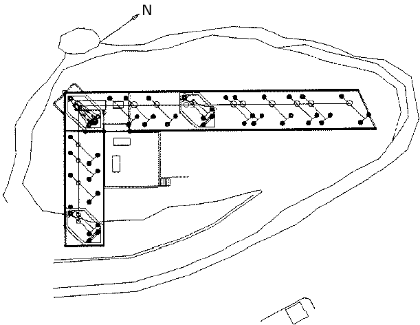 Plan général de l'interféromètre IOTA. Modification d'une image scannée sur un mémoire de thèse.GillesC 25 octobre 2005 à 14:29 (CEST)